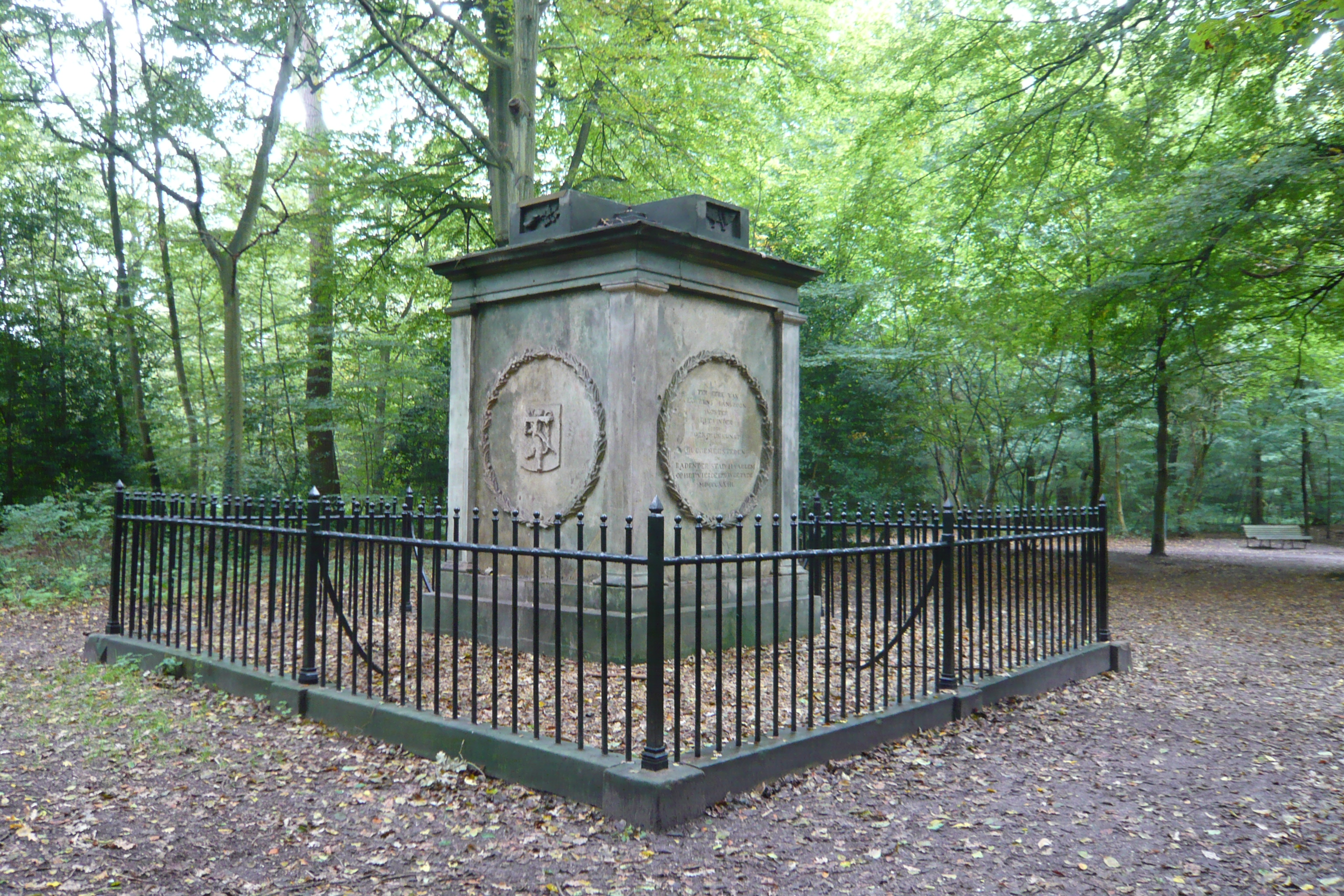 Monument voor Laurens Jansz Coster, in Haarlemmerhout.